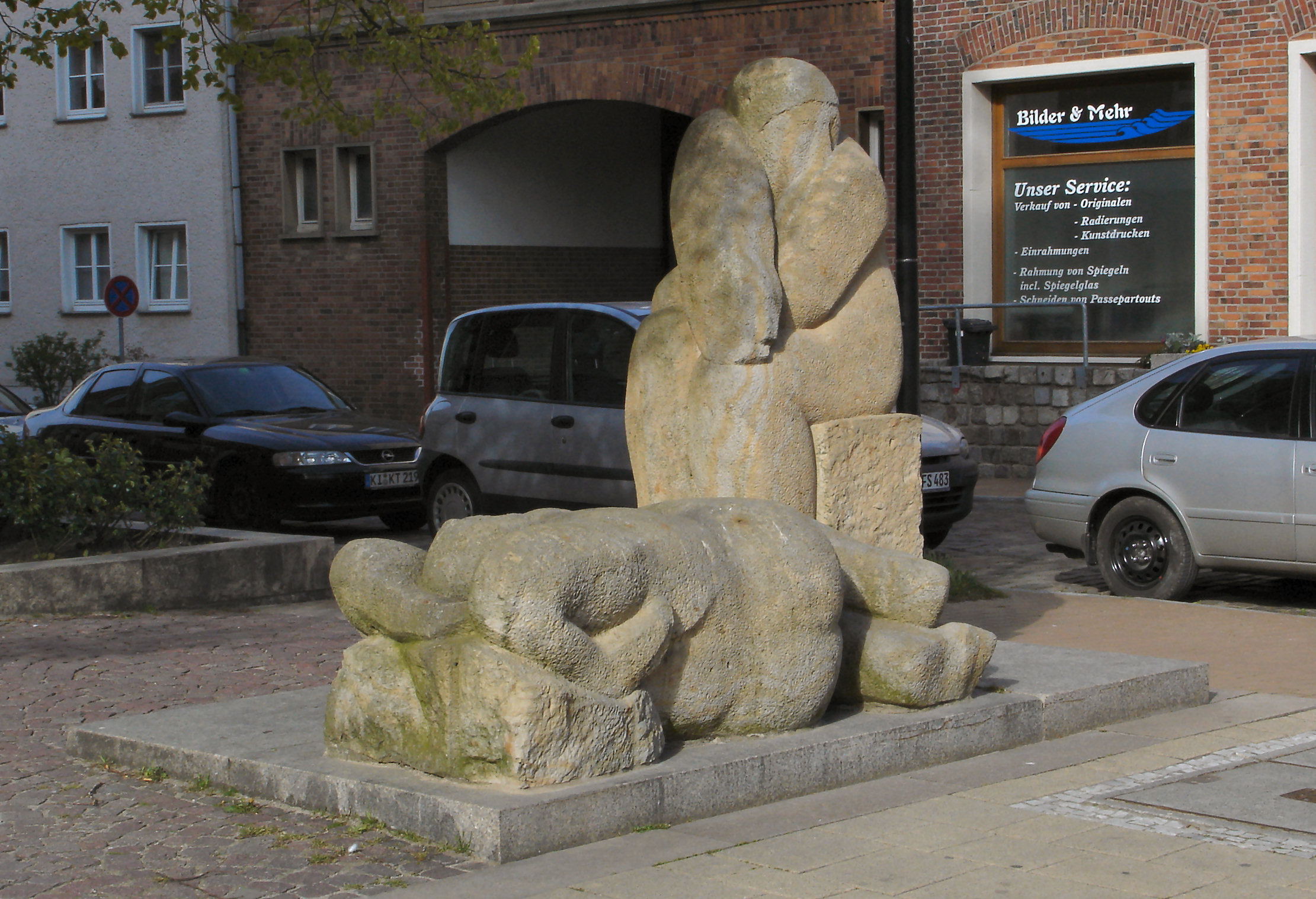 Sandsteinfigur "Das Paar" von Anne Sewcz in Rostock / Sculpture "Couple" of Anne Sewcz in Rostock